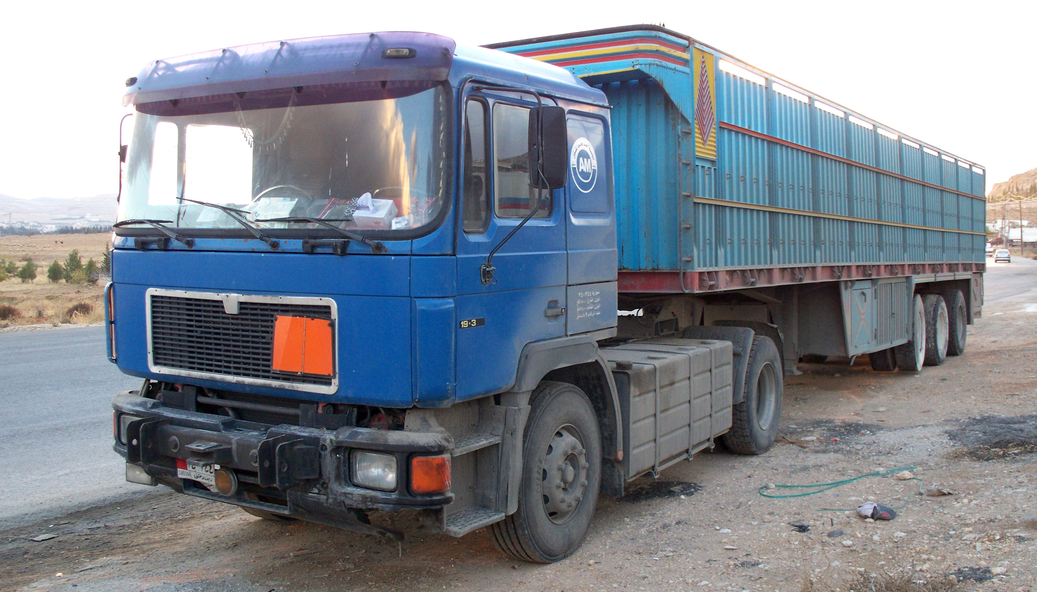 MAN Zugmaschine in Syrien.